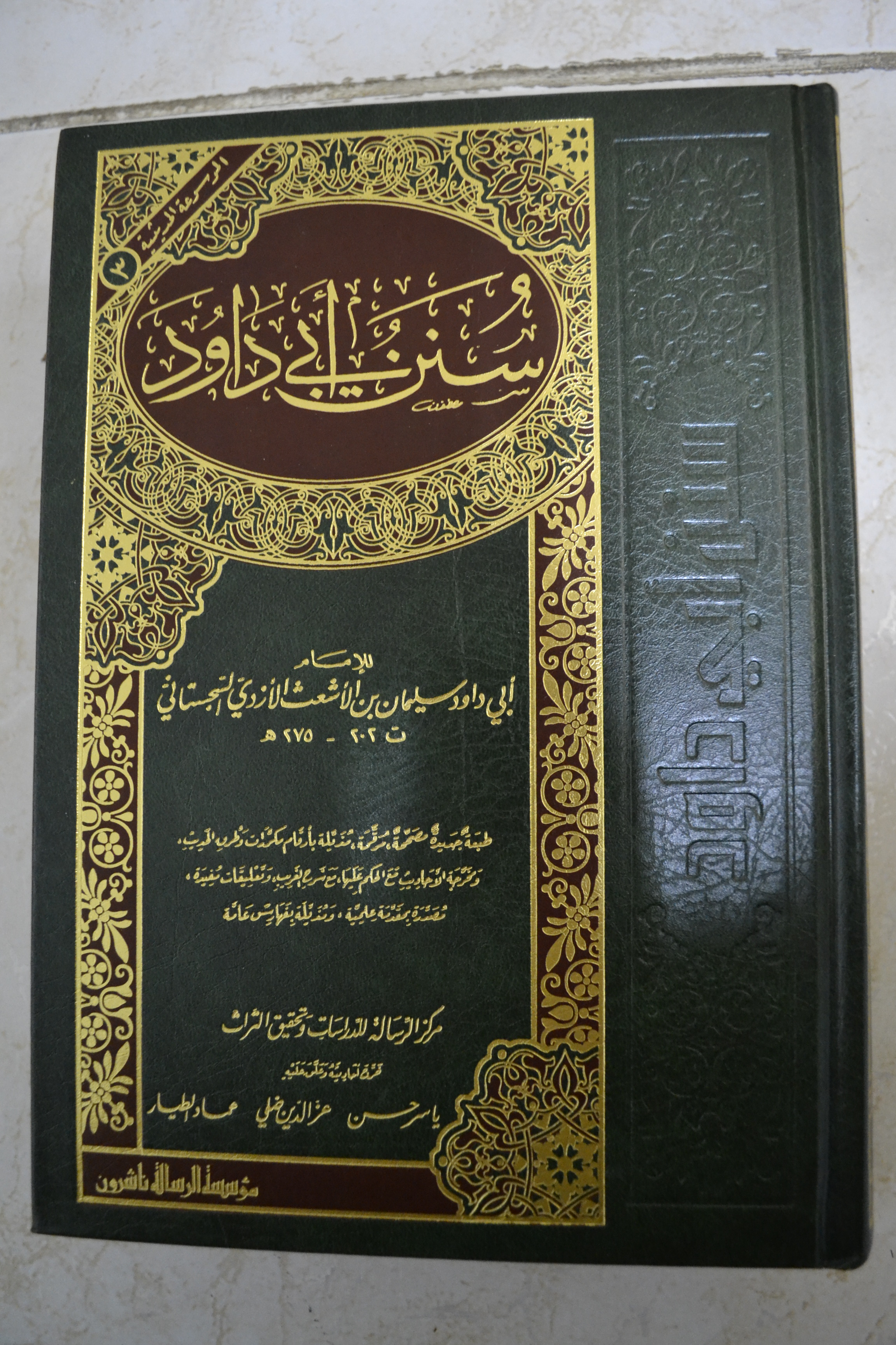 Kitab ini ditulis oleh Imam Abu Dawud